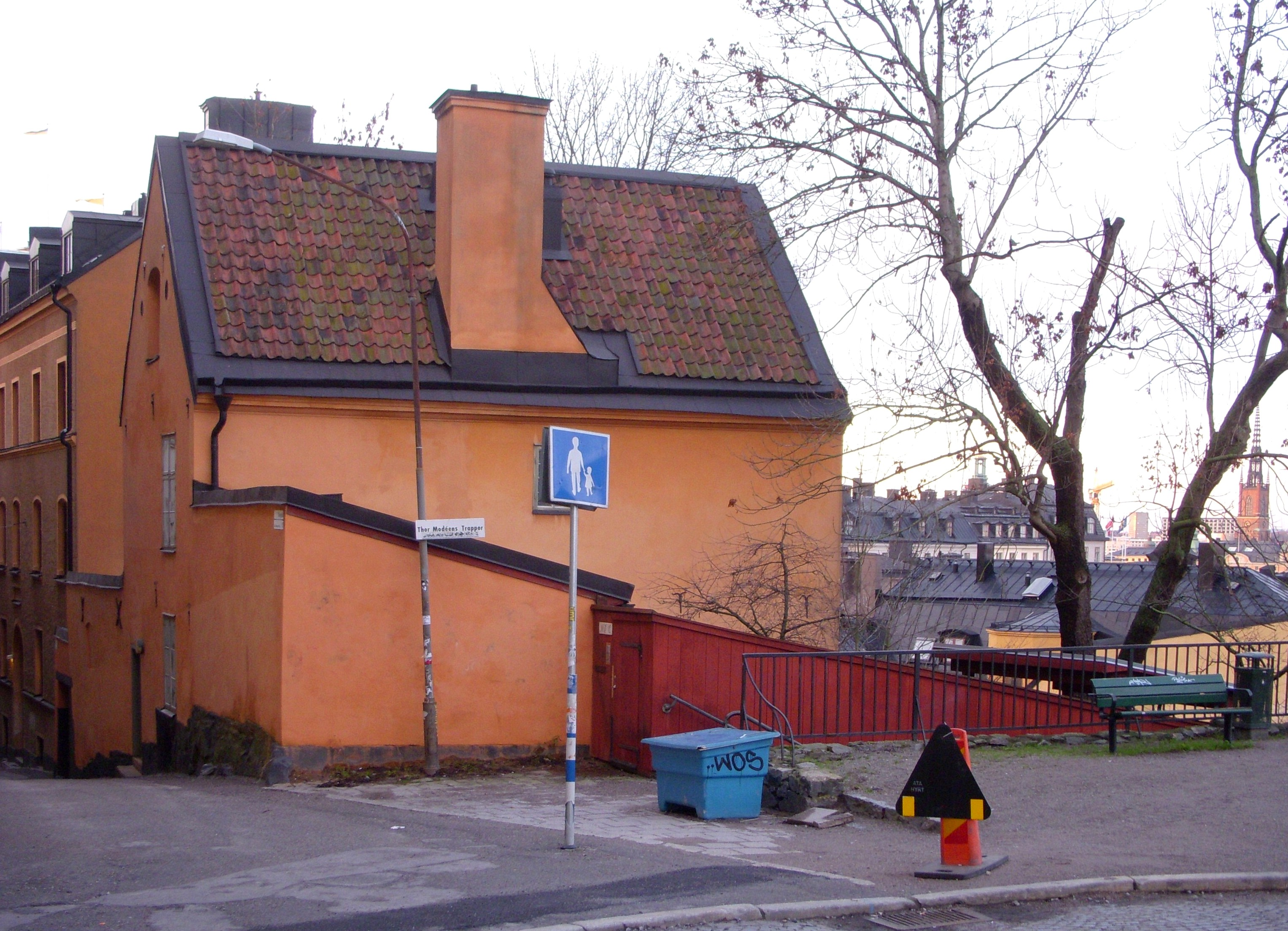 Klevgränd 1C i Stockholm